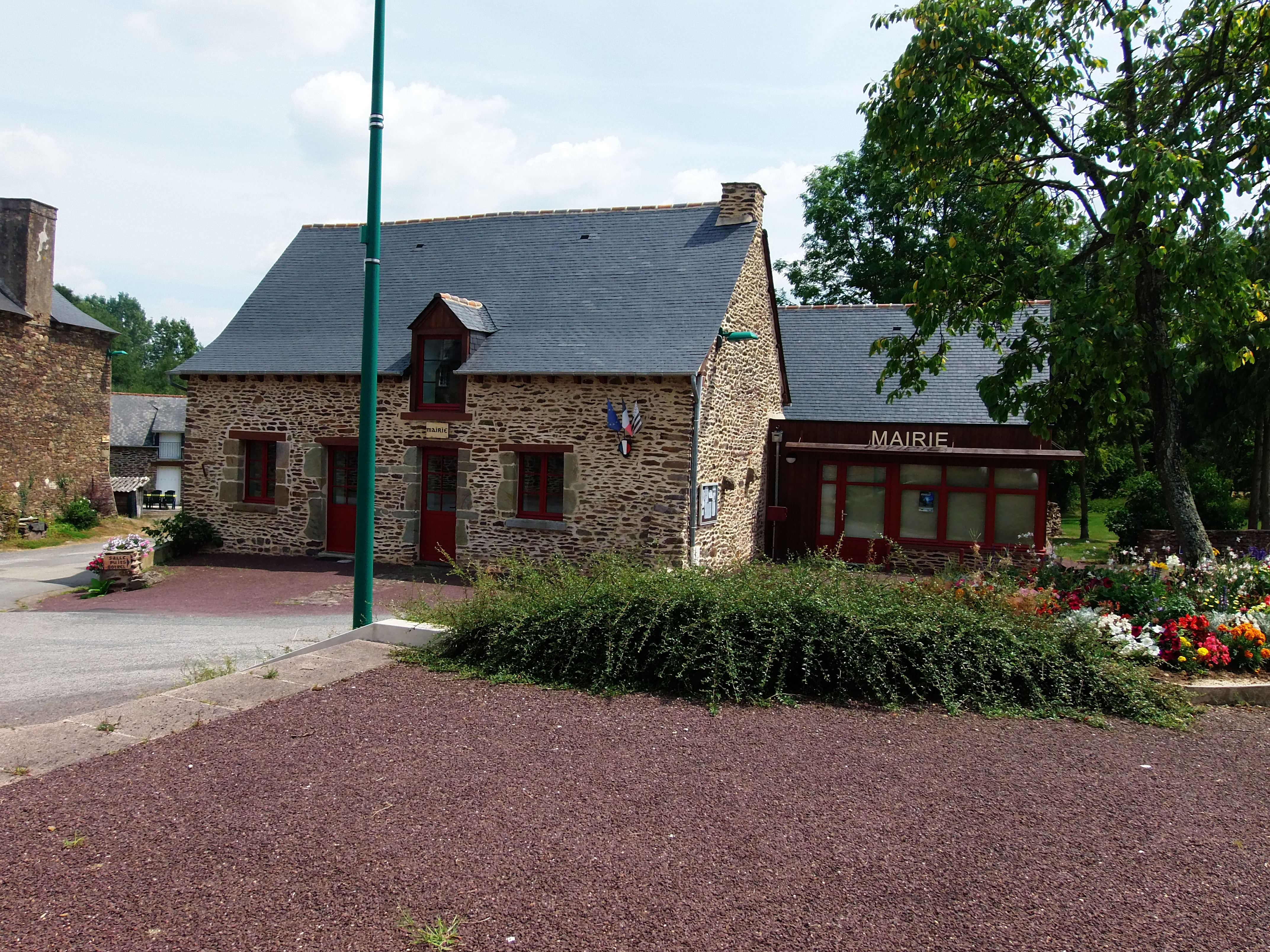 Mairie prise depuis la place du monument aux morts.